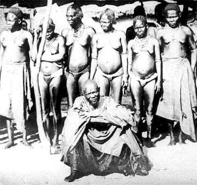 Le roi Comé II des Moundang de Léré avec quelques épouses